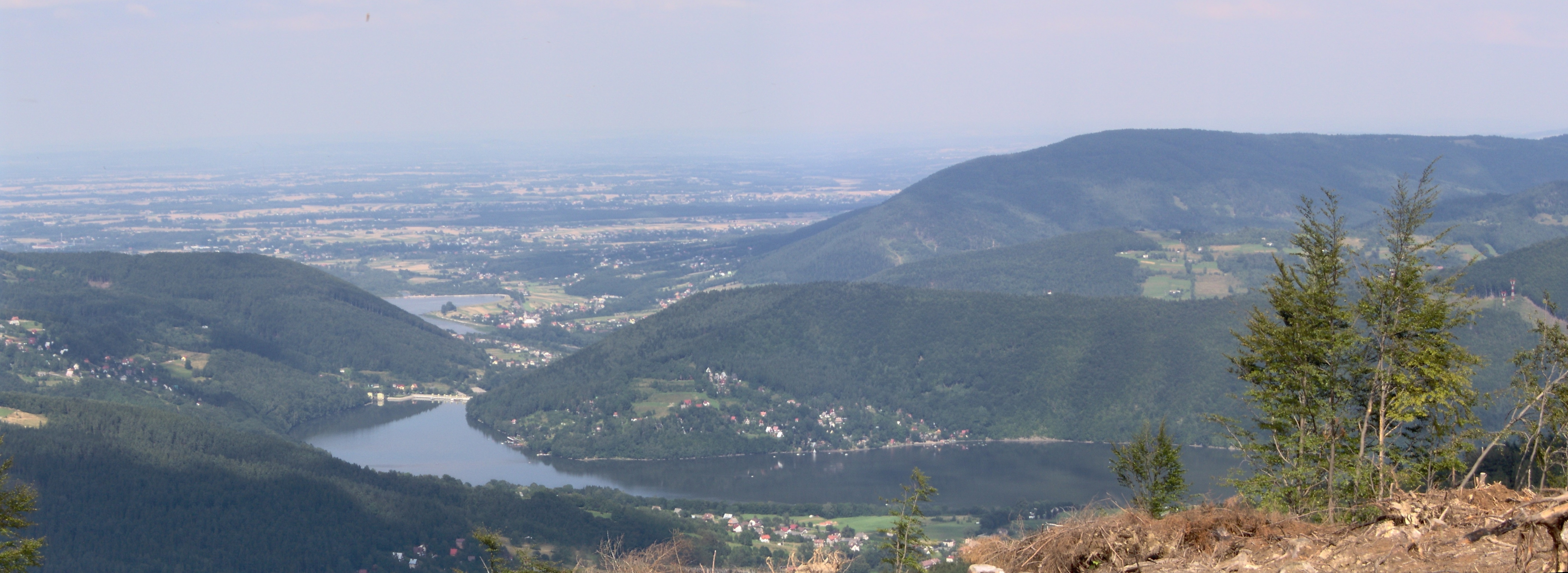 Widok na jezioro Międzybrodzkie z góry Czupel. Autor: Li Hor